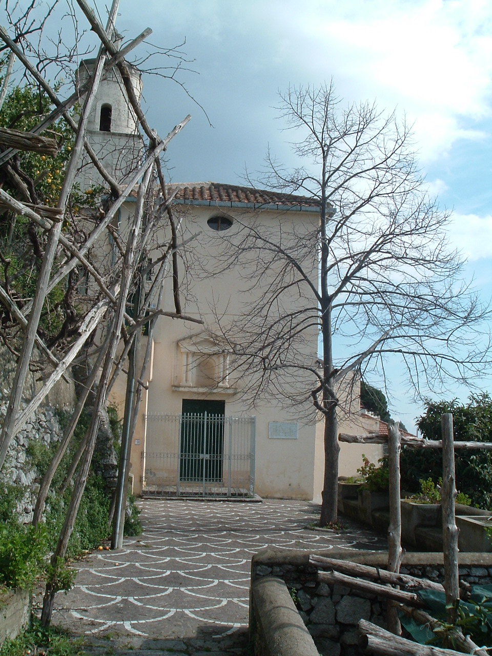 Chiesa di San Michele Arcangelo (Conca dei Marini)